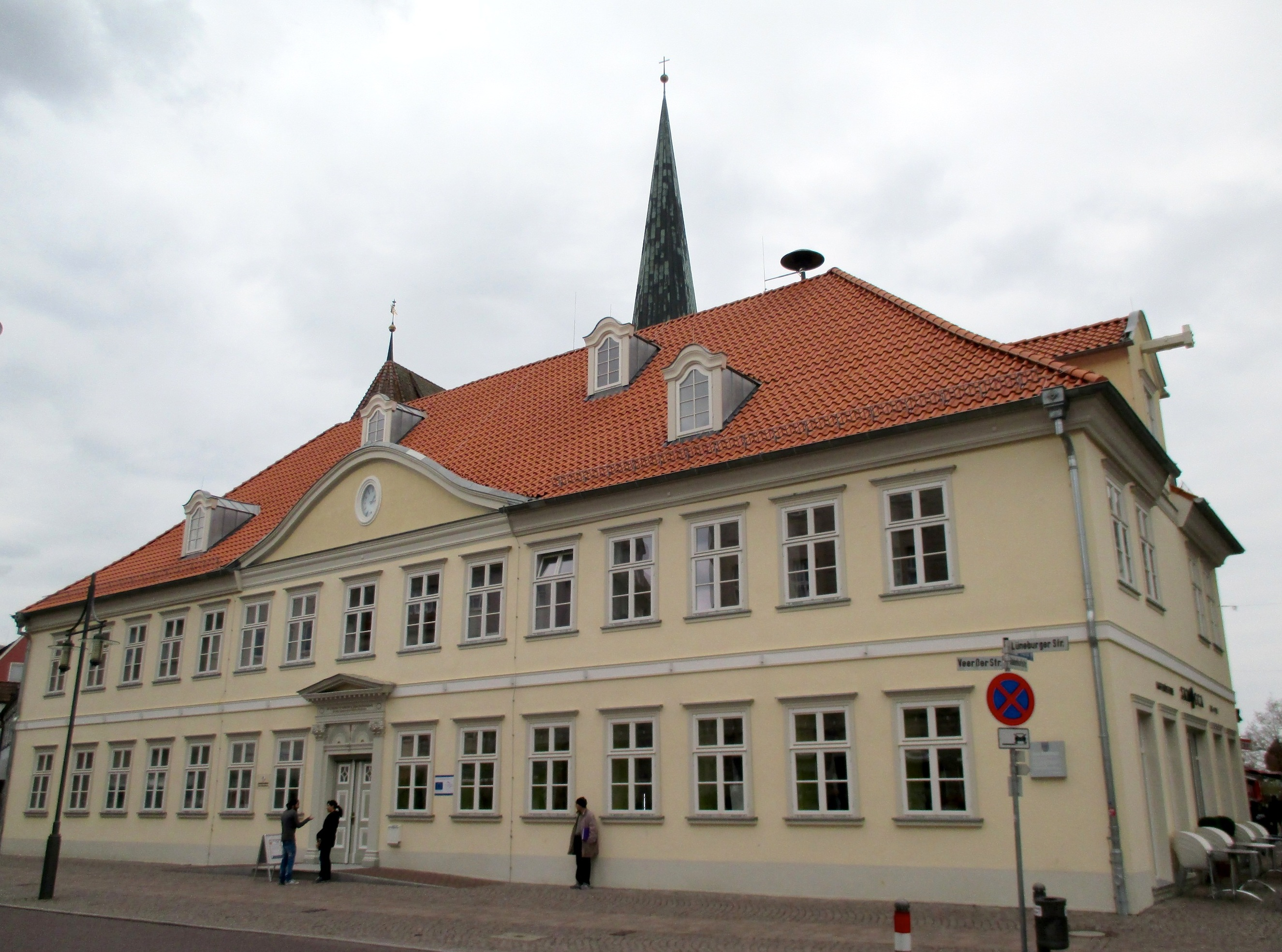 Altes Rathaus, Uelzen